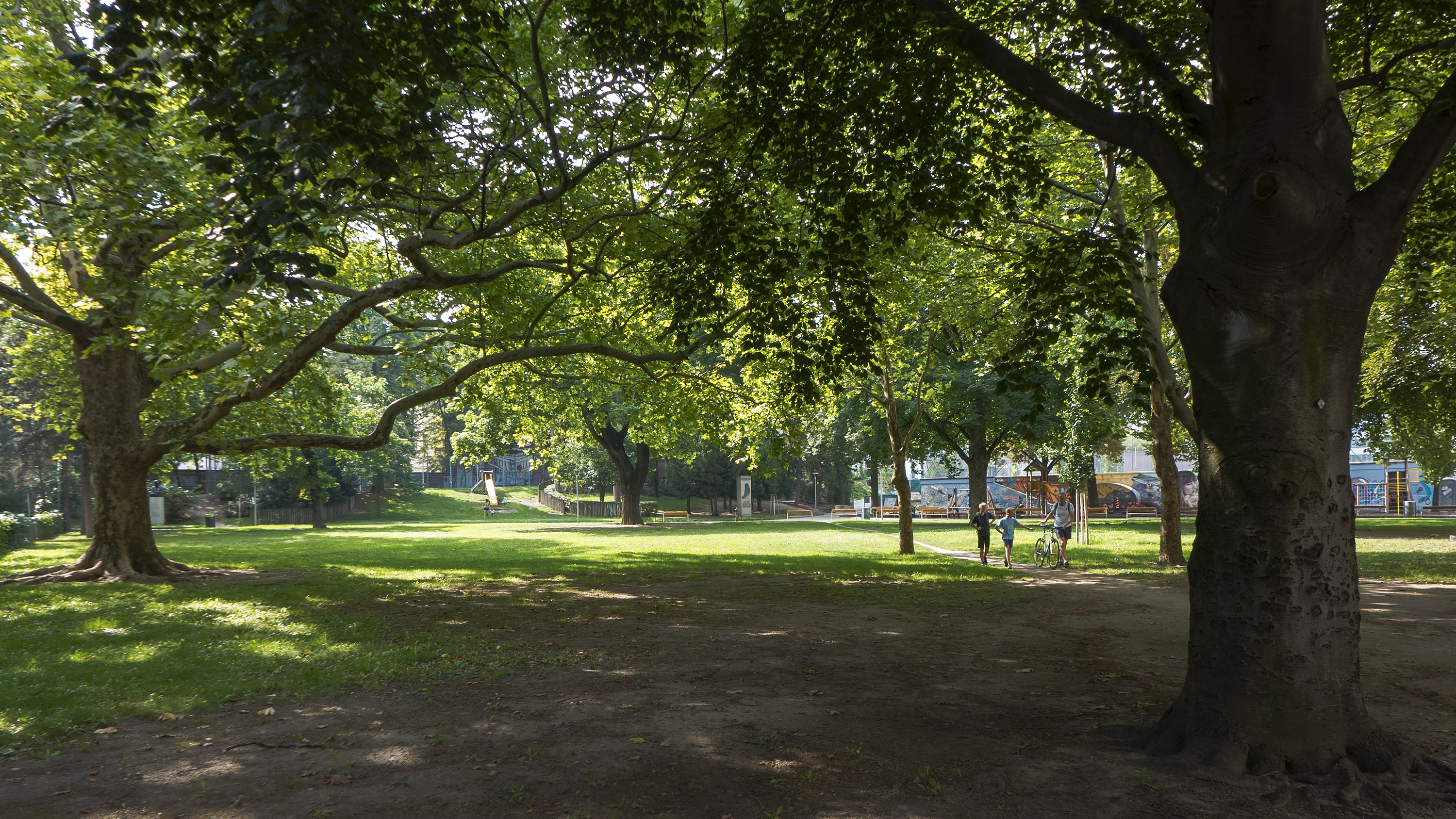 Arne-Carlsson-Park in Wien 9